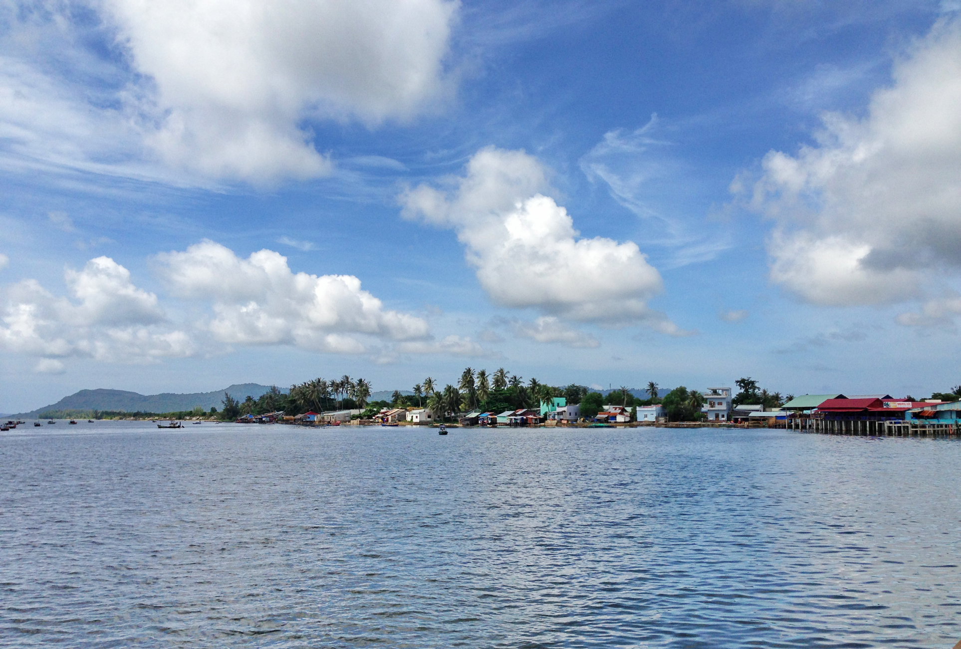 Biển hàm Ninh, rạch hàm, Phú quốc, Kiên Giang, vn